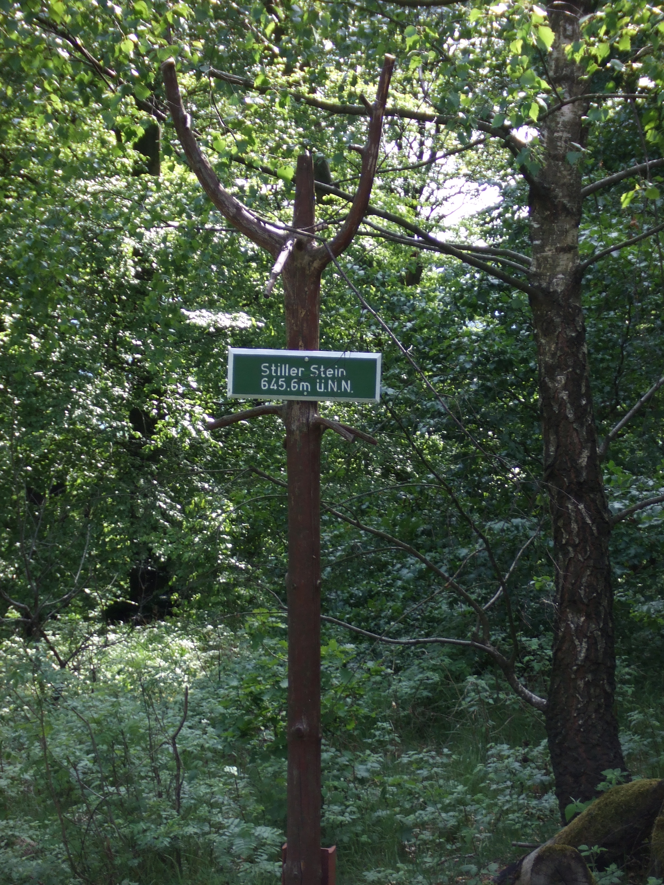 Bild von der Höhe des Stiller Steins